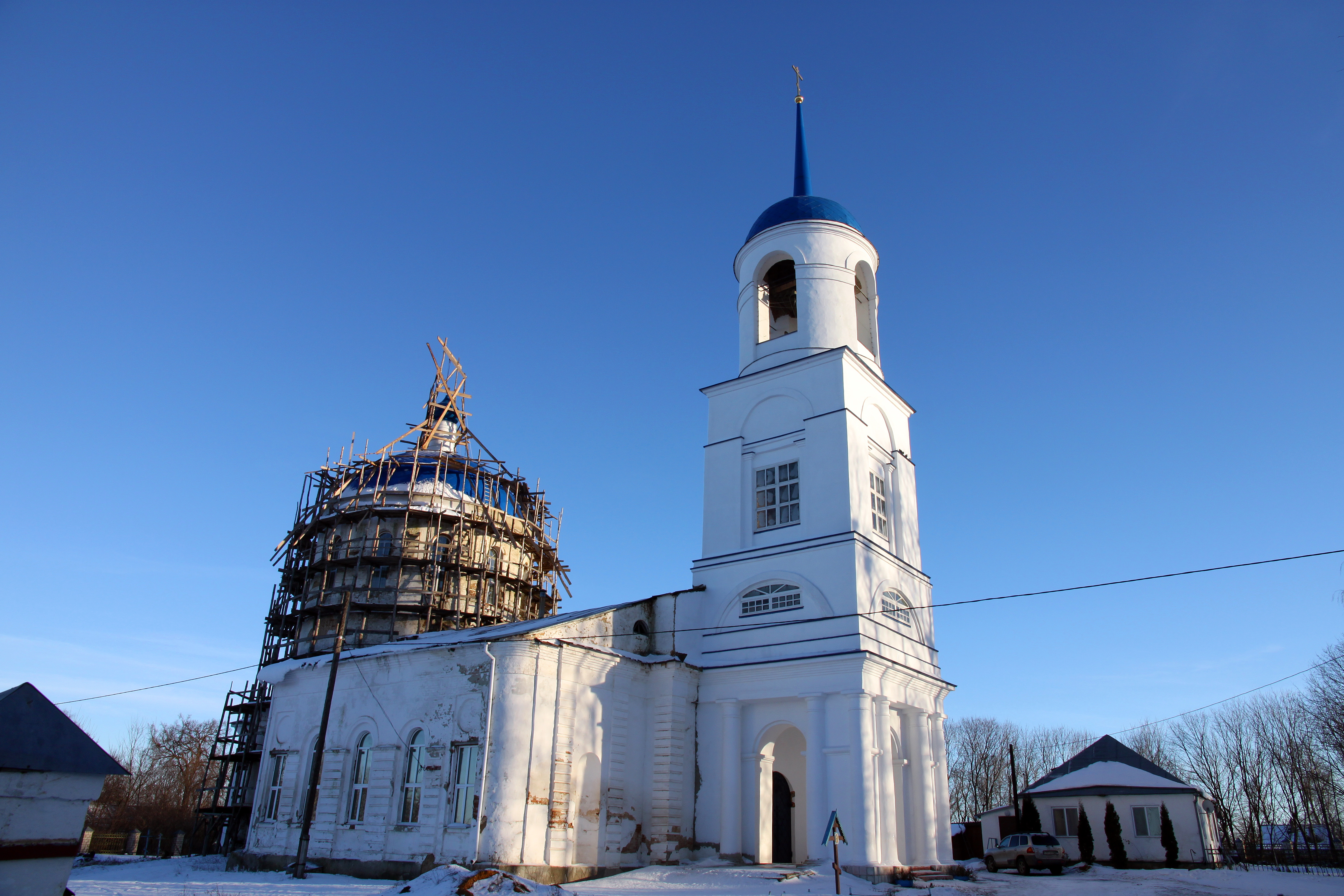 Покровская церковь (Орловская область, Малоархангельск, село Архарово)